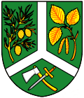 znak obce